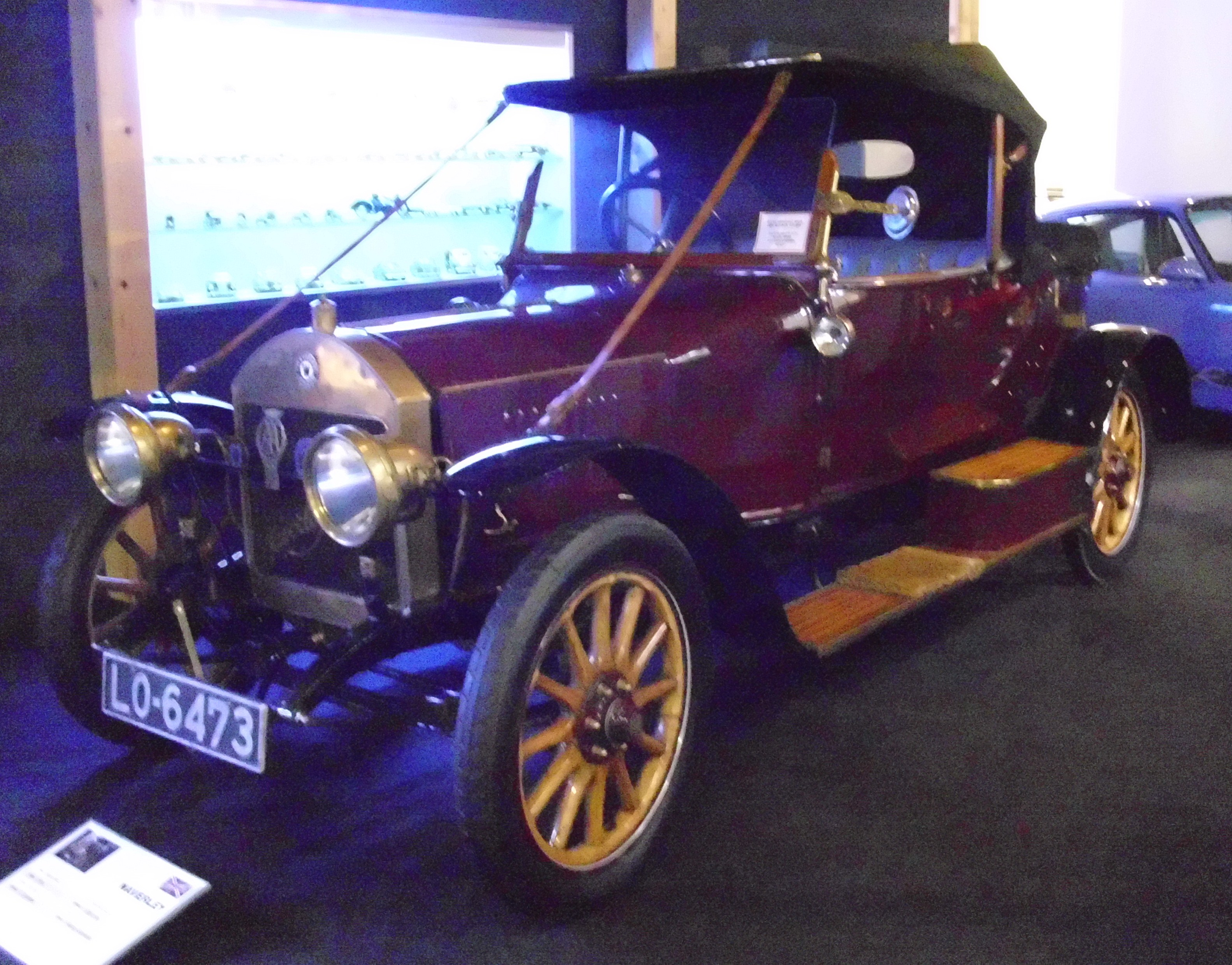 Waverley 1915 im Oldtimermuseum Koller Heldenberg